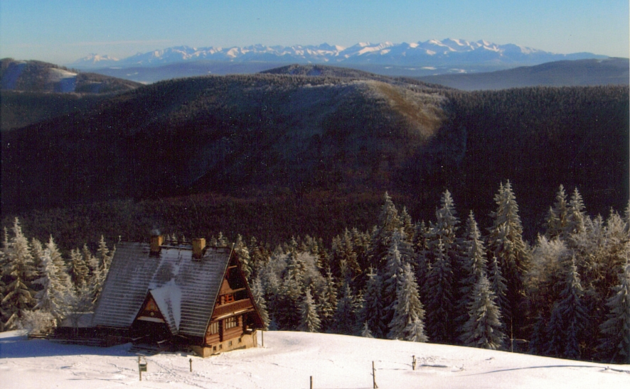 Panorama Tatr z Rycerzowej zimą